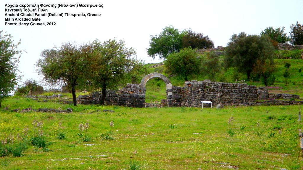 Αρχαία Φανοτή, Κεντρική πύλη